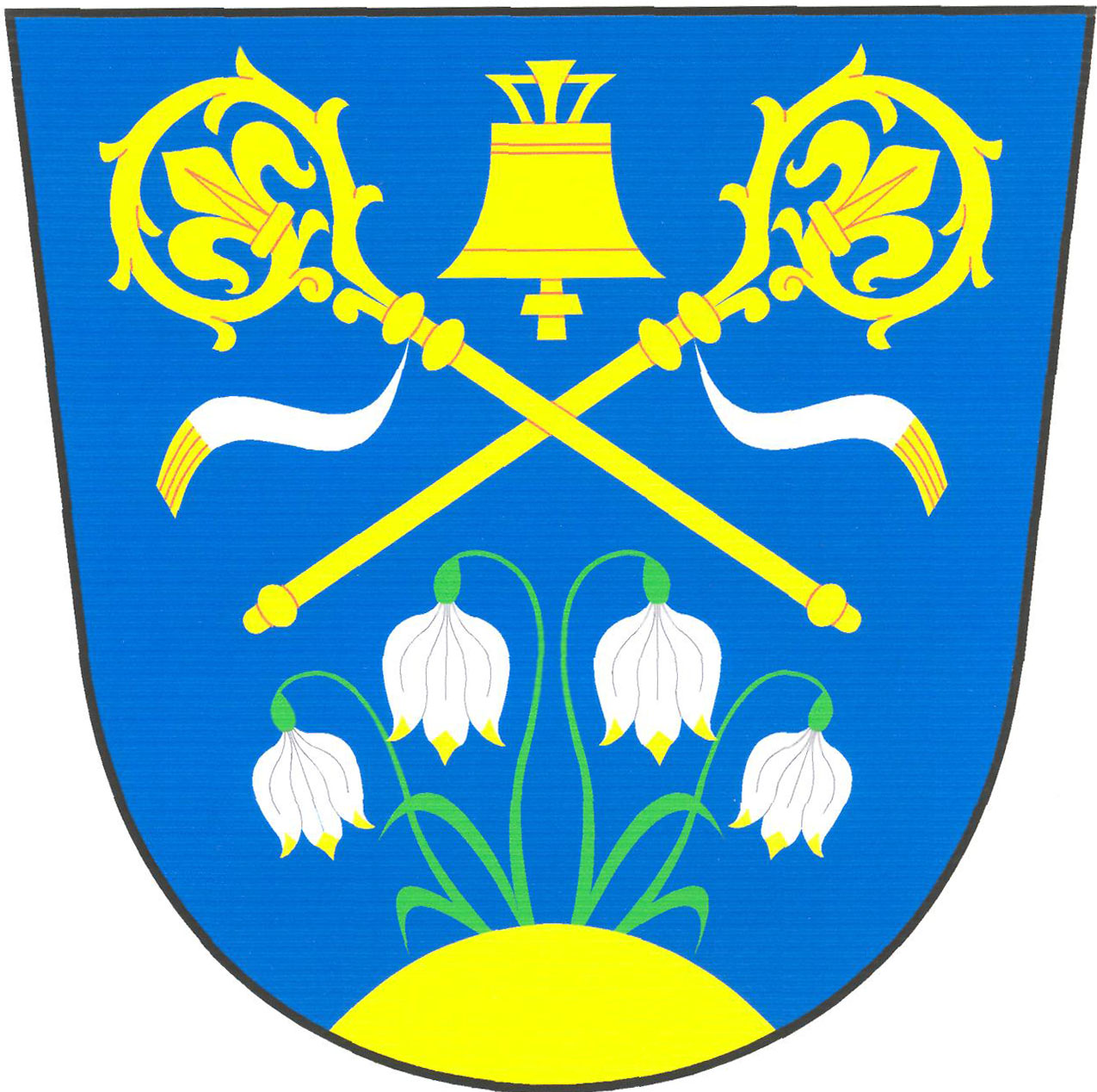 Znak obce Krásné (okres Chrudim)